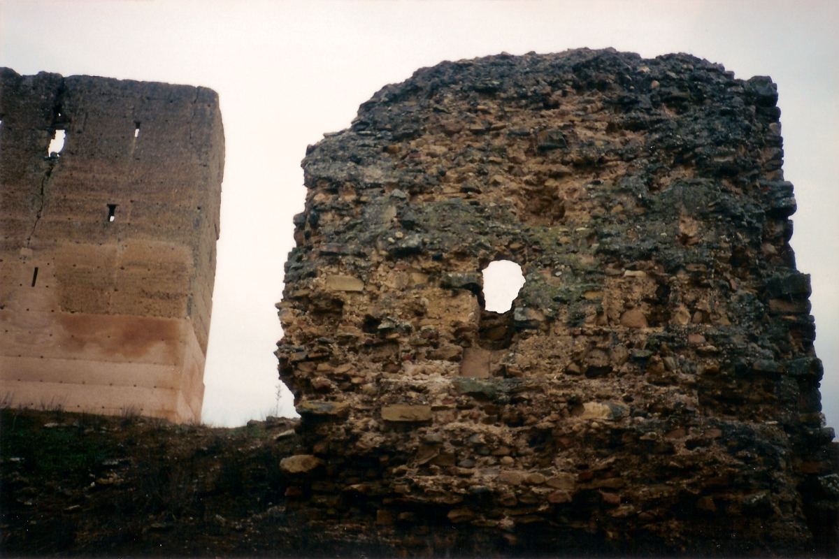 Castillo de Santa Eufemia, en Cástulo (Linares, provincia de Jaén, Andalucía).